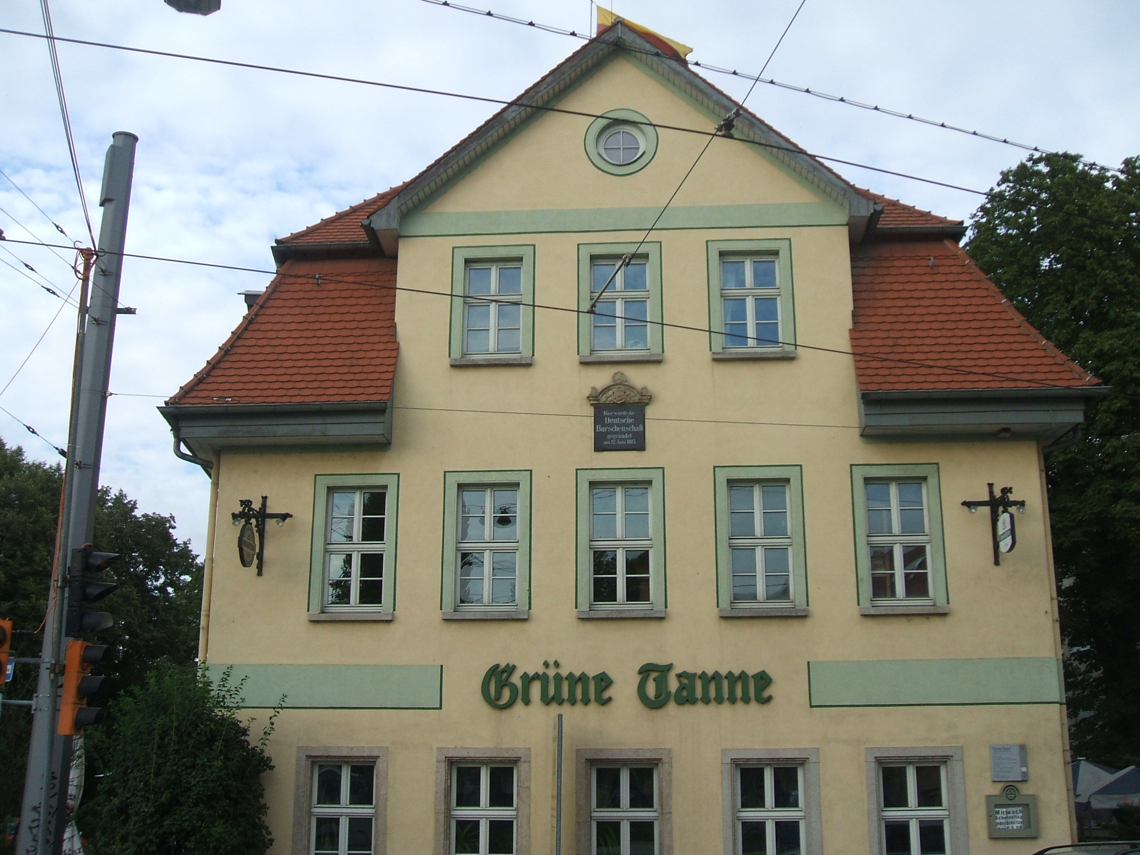 Gruenne Tanne, Jena/Germany